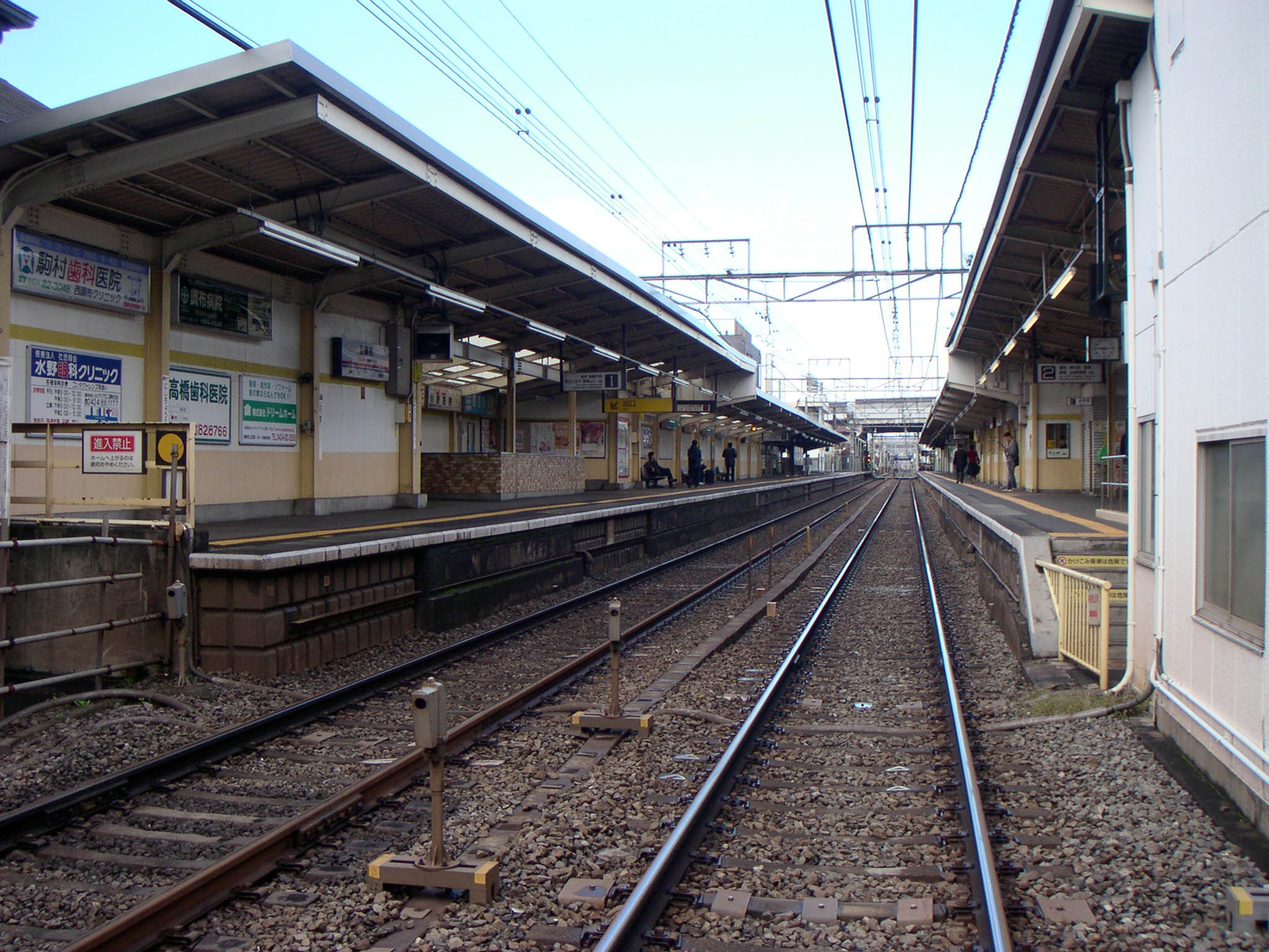 Nishichōfu Station, Keio Line, Tokyo, Japan